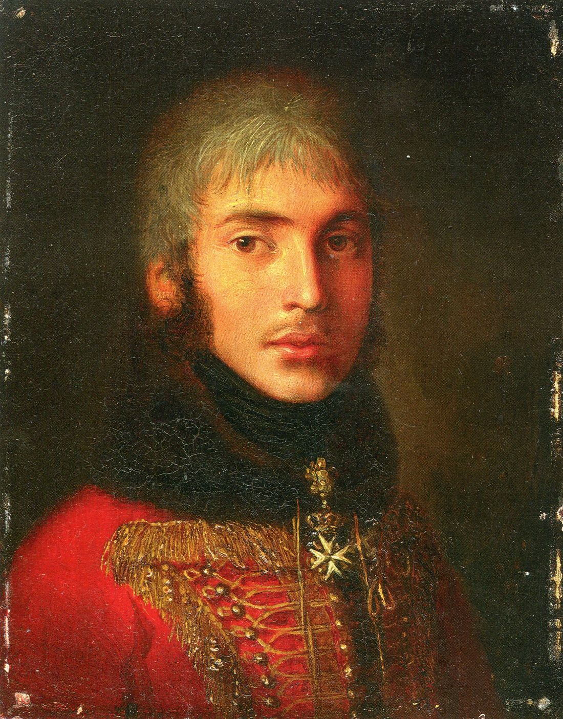 "Портрет князя Александра Фёдоровича Щербатова". Дерево, масло. 15 × 12 см. Частная коллекция (Собрание Подстаницких, Москва)